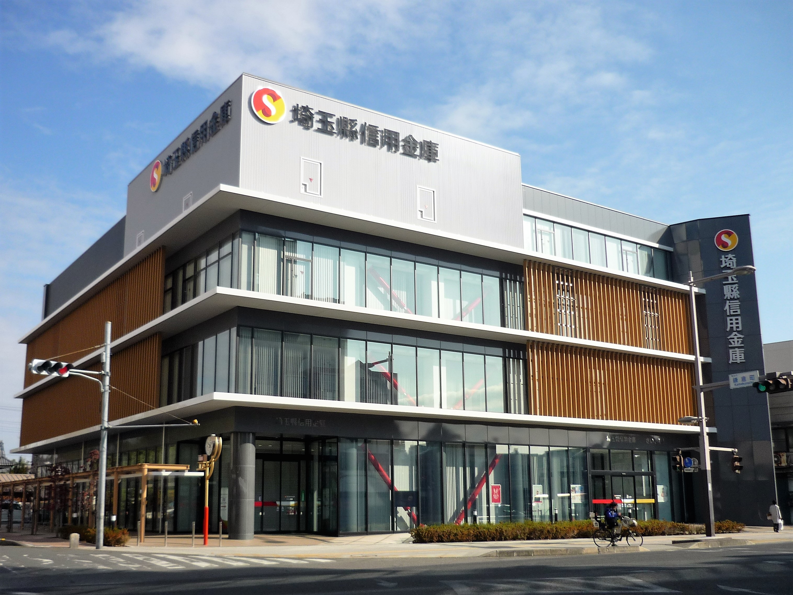 埼玉縣信用金庫 本店営業部（熊谷市本町） Panasonic Lumix DMC-FS3